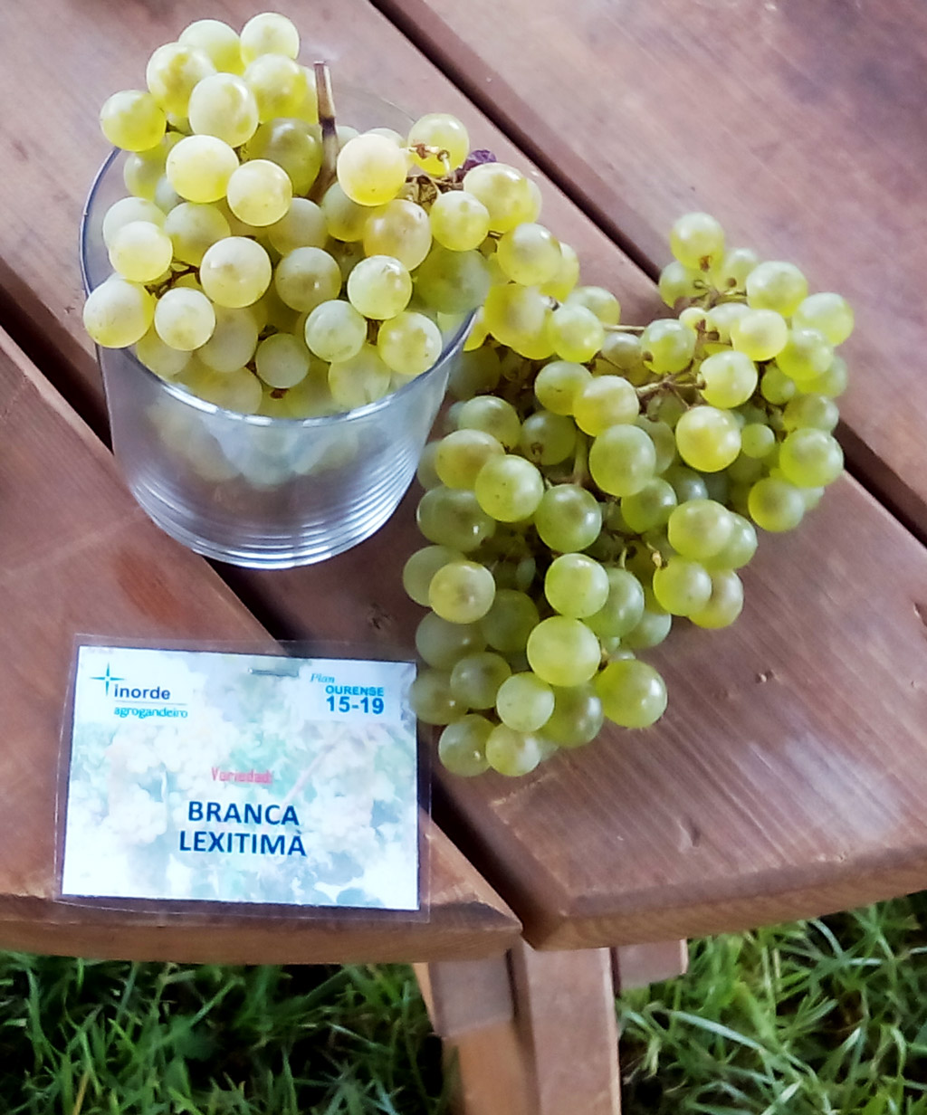 Racimo de Branco Lexítimo nunha mostra da Deputación de Ourense en Boimorto.